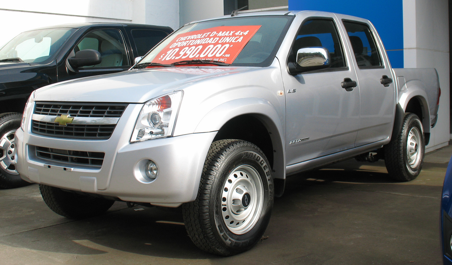 2011 Chevrolet D-Max LS